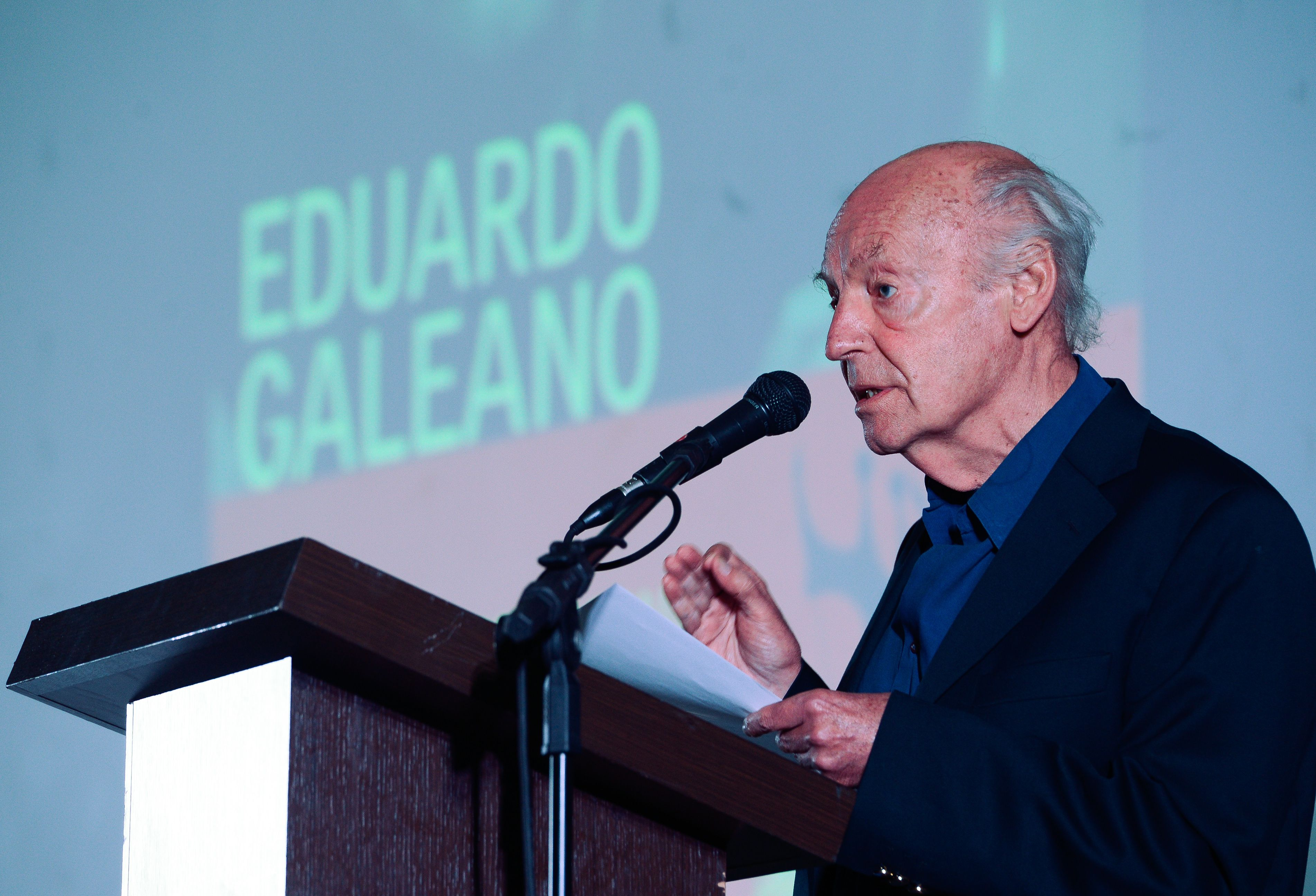 O jornalista e escritor uruguaio Eduardo Galeano